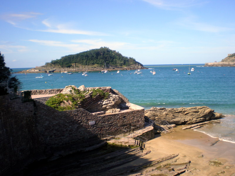 Loretopea, Donostia.